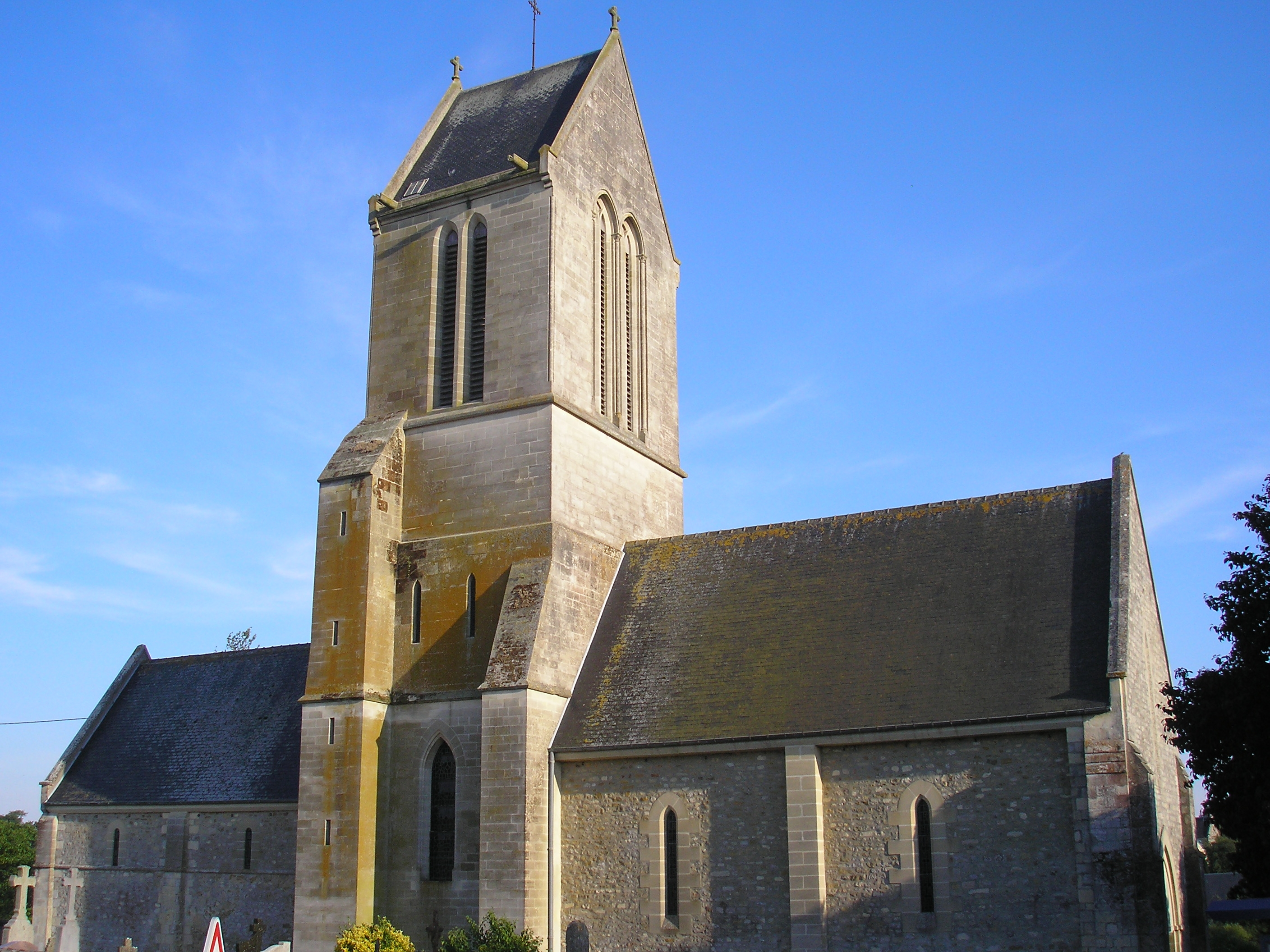 Vendes (Normandie, France). L'église Saint-Martin.